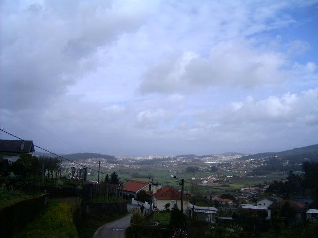 São Pedro de Escudeiros, Braga (the city behind), seen from Lugar do Monte.